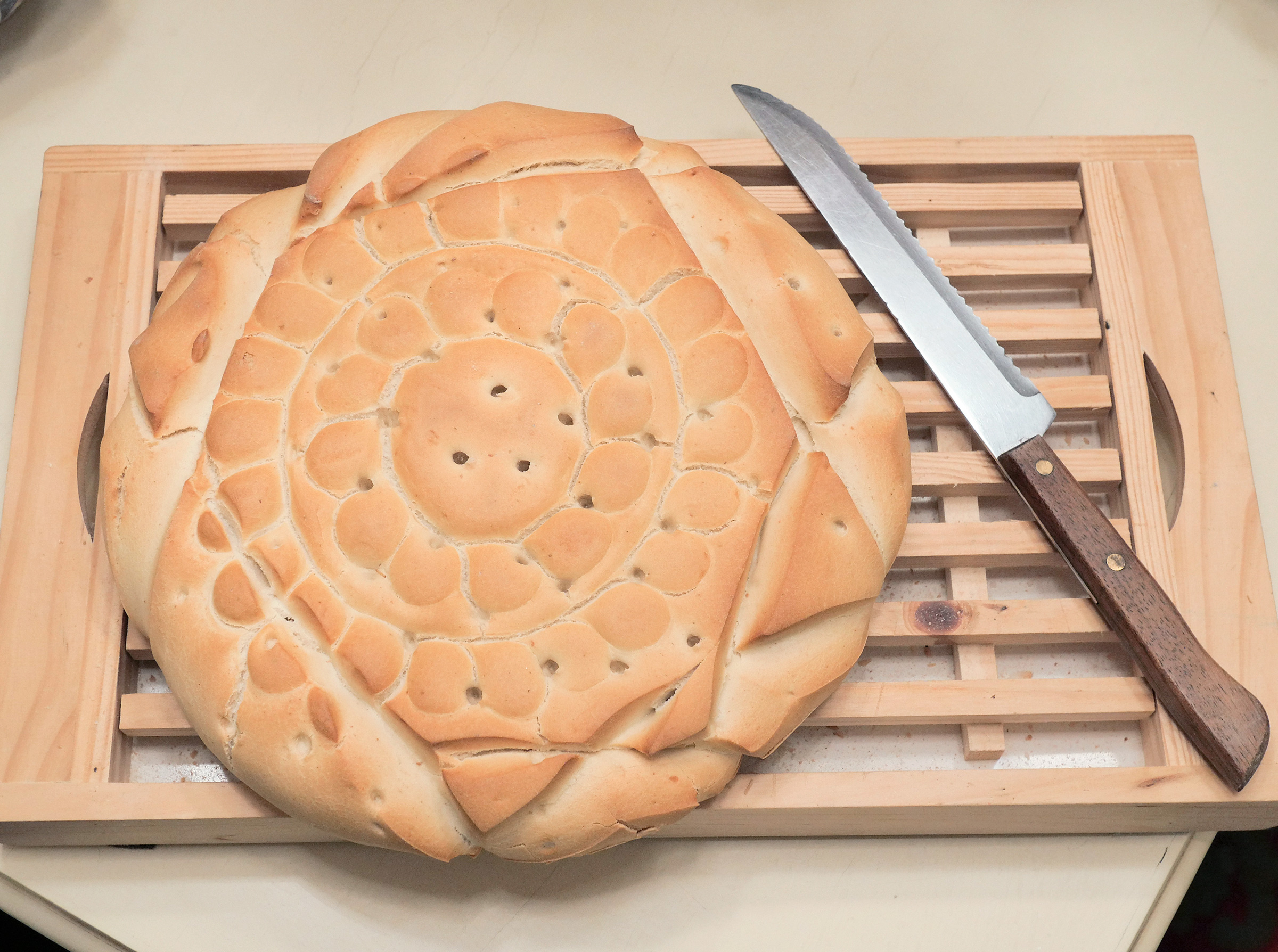 Pan lechuguino, pieza delgada de pan candeal conformado con molde y cortes que delimitan canteros. Típico de Tierra de Campos, extendido a Valladolid y el centro de Castilla la Vieja y León.